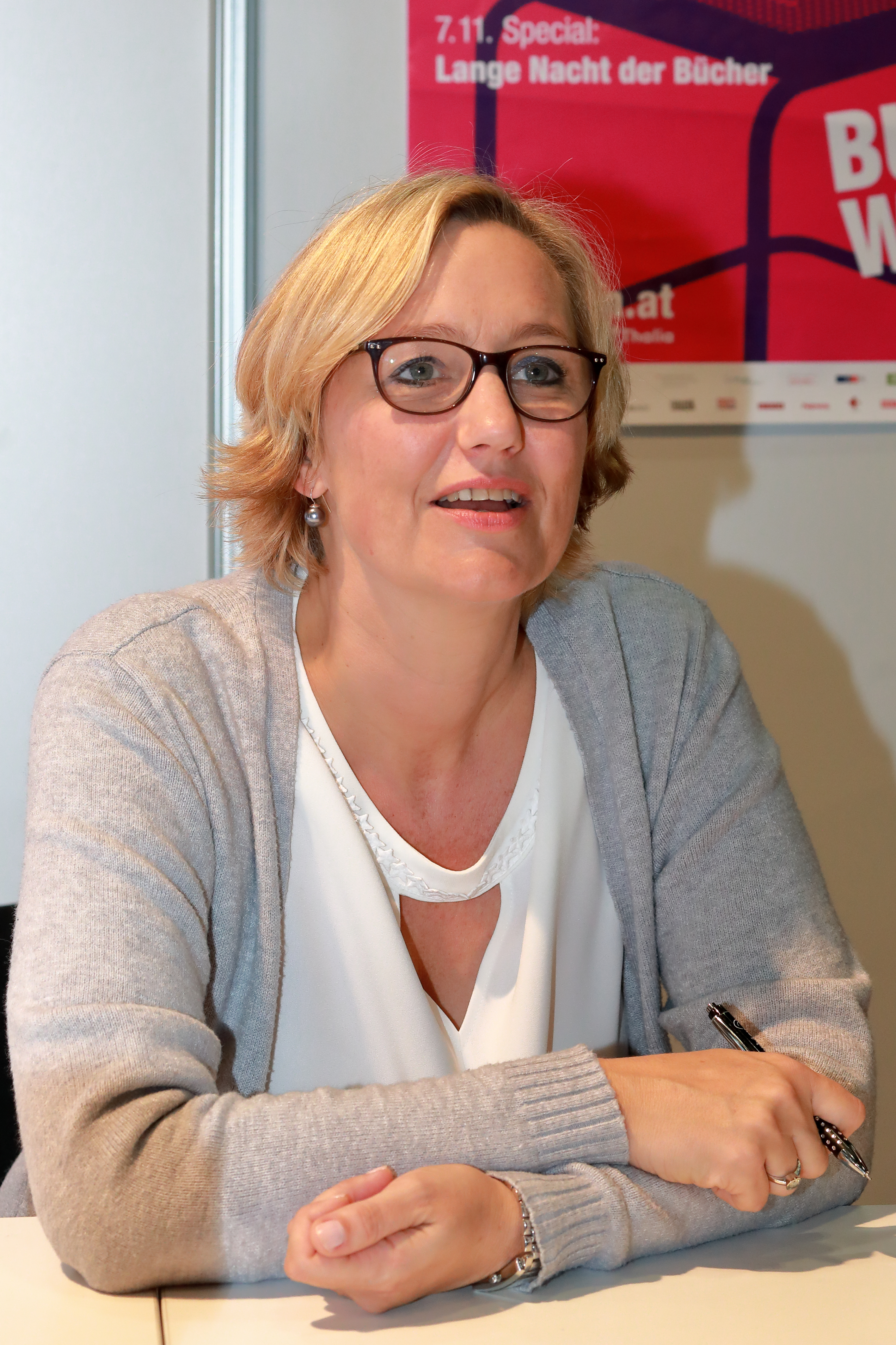 Die österreichische Journalistin und Fernsehmoderatorin Birgit Fenderl auf der Wiener Buchmesse 2018.